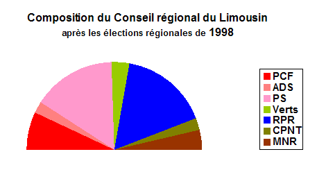 Composition du conseil régional du Limousin après les élections régionales de 1998